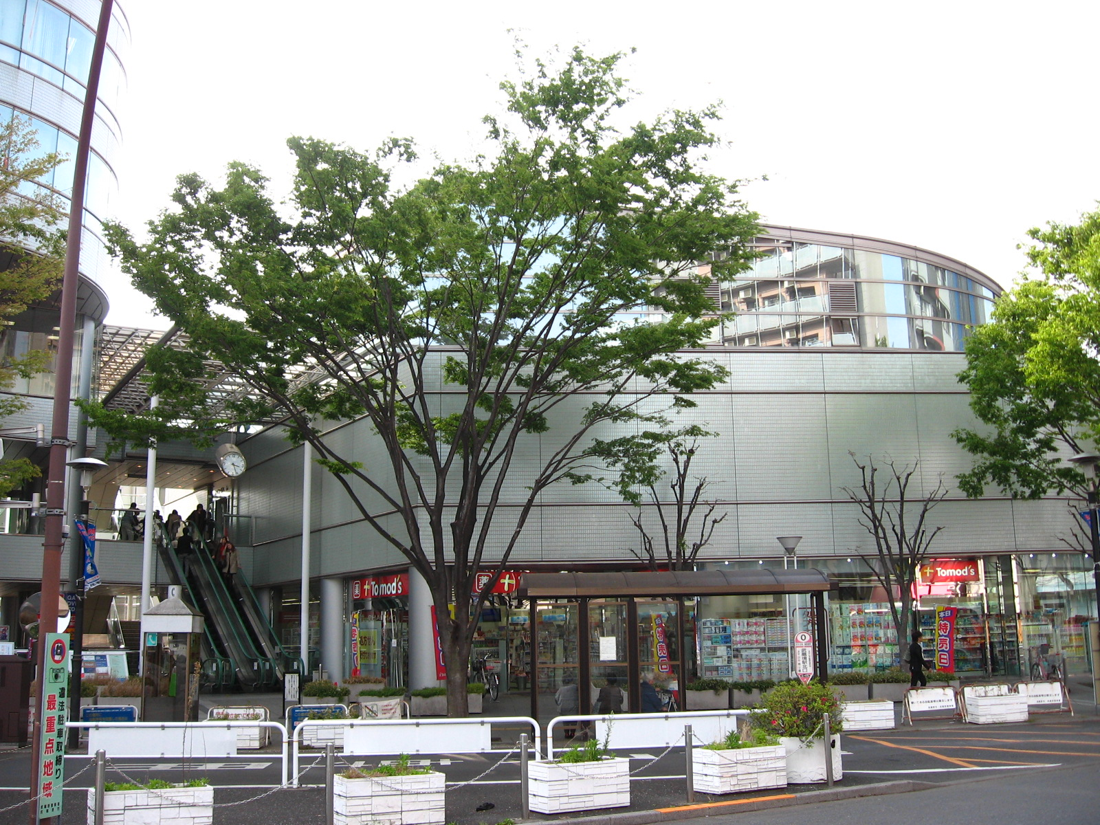 東京都武蔵野市境の「スイングビル」北棟。多目的ホール「武蔵野スイングホール」もこの建物にある。